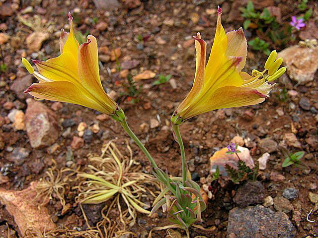 "repollito amarillo" or lirio amarillo Alstroemeria kingii Combarbala area, Chile